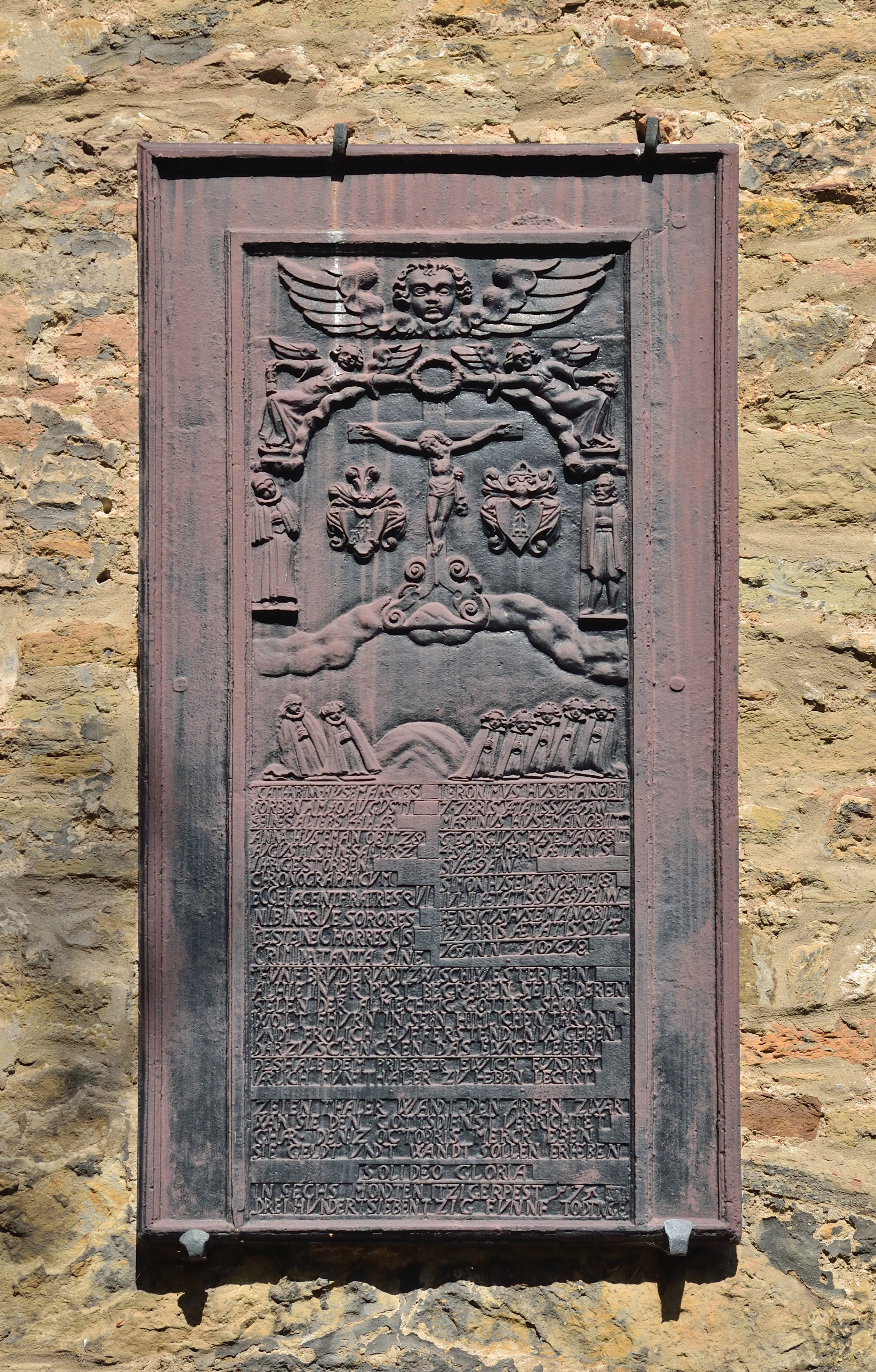 This is a photograph of an architectural monument. Katholische Kirche St. Marien, Pesttafel von 1618